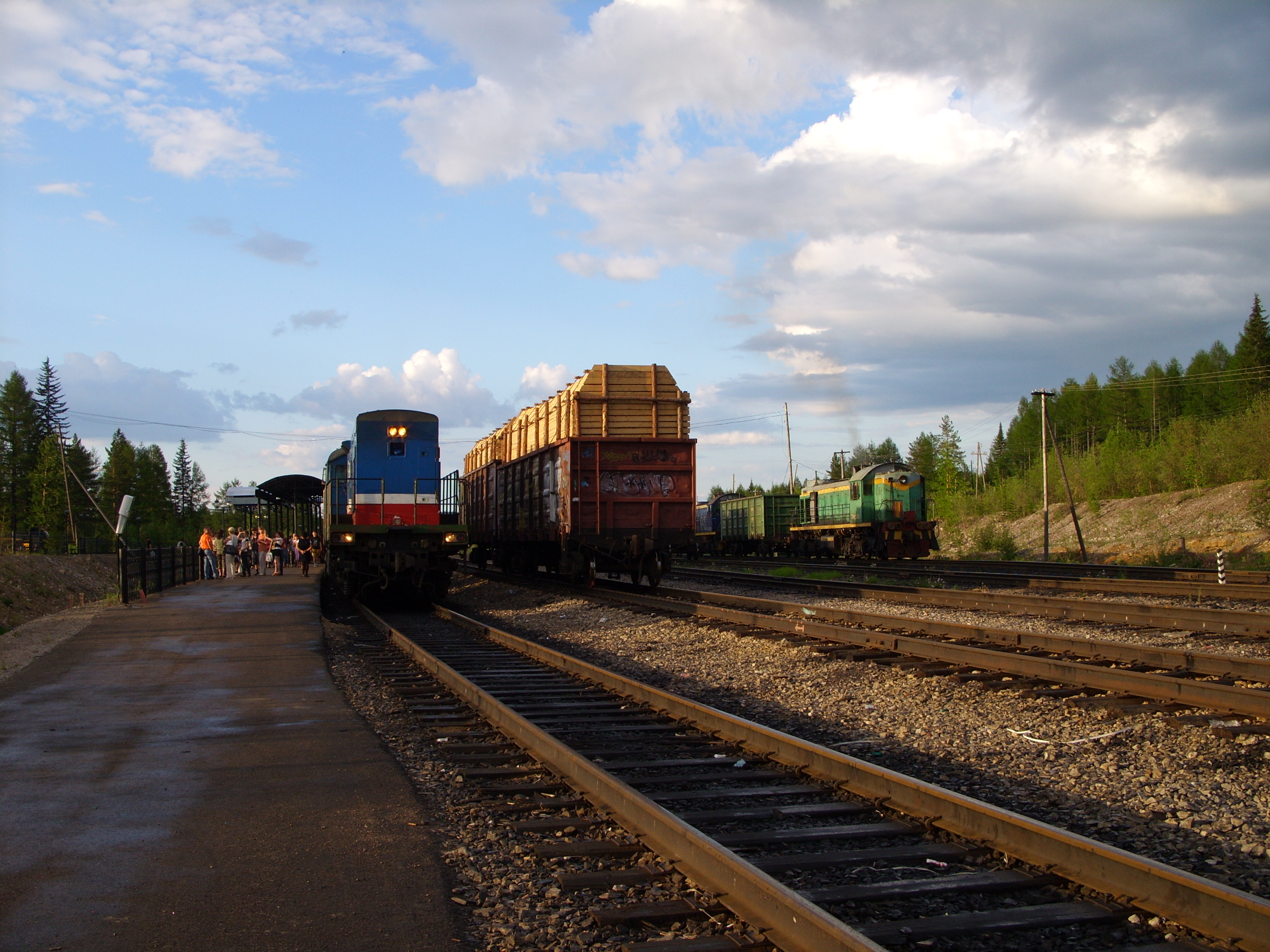 Станция Алдан. Август 2009 г. На ближнем пути под тепловозом пассажирский поезд № 323 Томмот - Нерюнгри